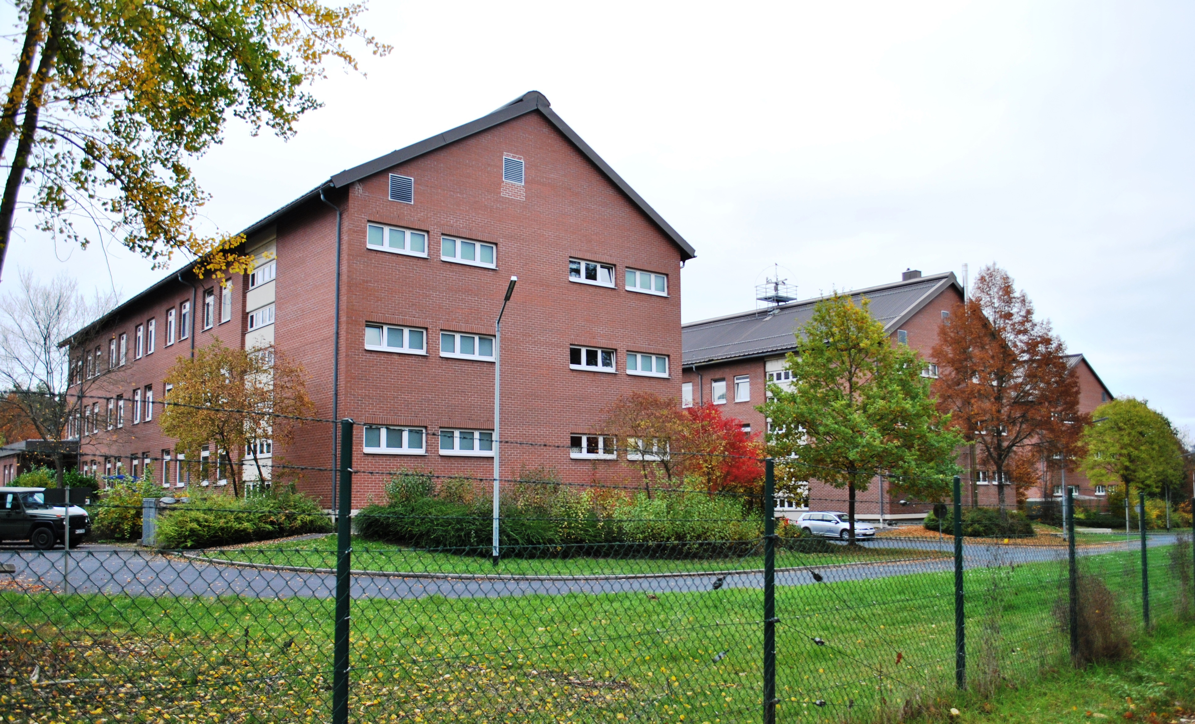 Mainfranken-Kaserne, Dimbacher Straße, Volkach